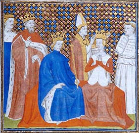 Korunovace Ludvíka VIII a Blanky Kastilské. Grandes chroniques de France, Louis VIII of France, Chapter 1, New York, Pierpont Morgan Library, MS M.536 fol. 224r